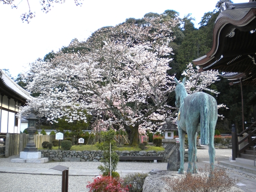 Renge-duka, Tachibana-dera